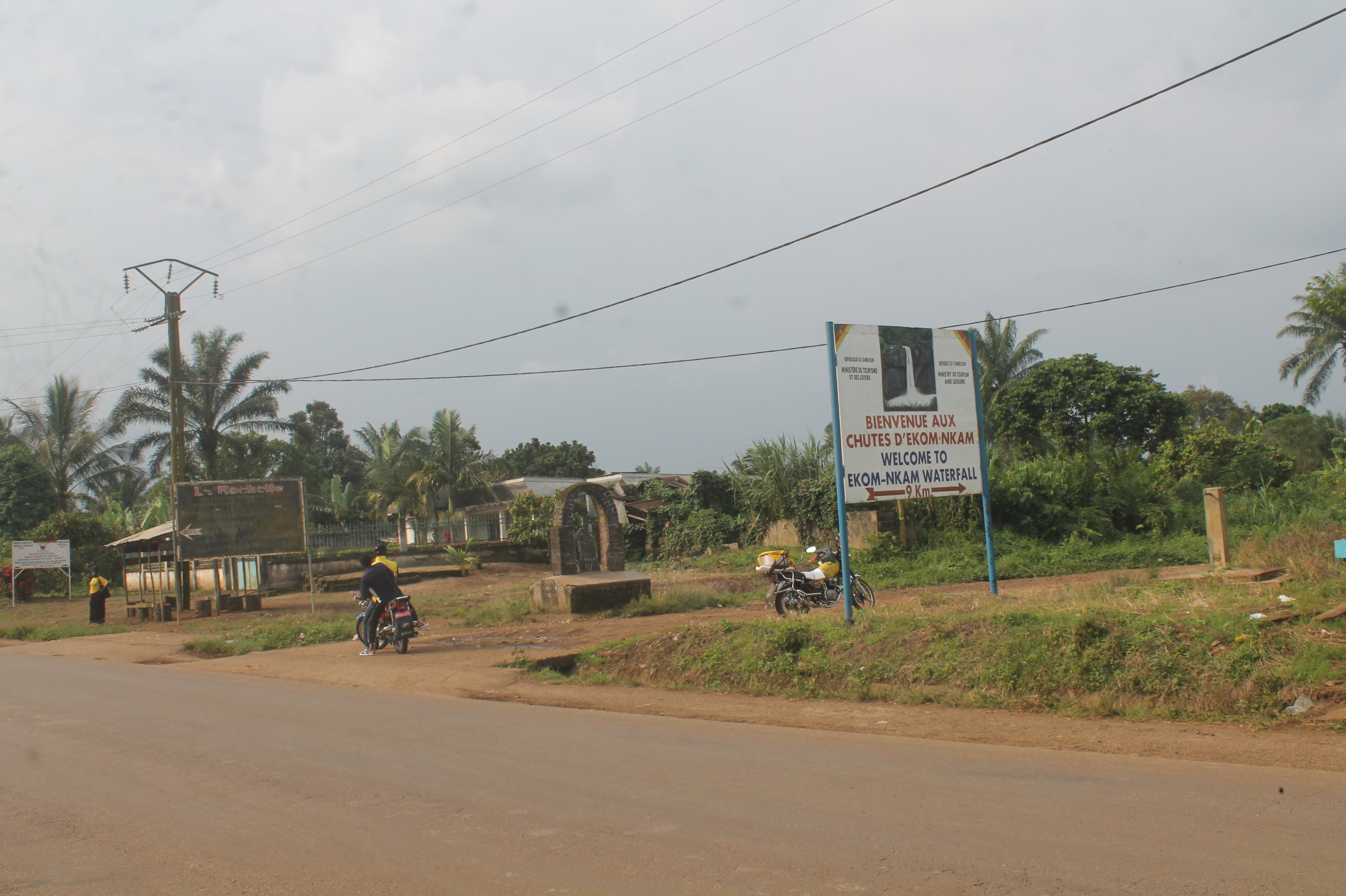 Entrée des des chutes d'EKOM NKAM